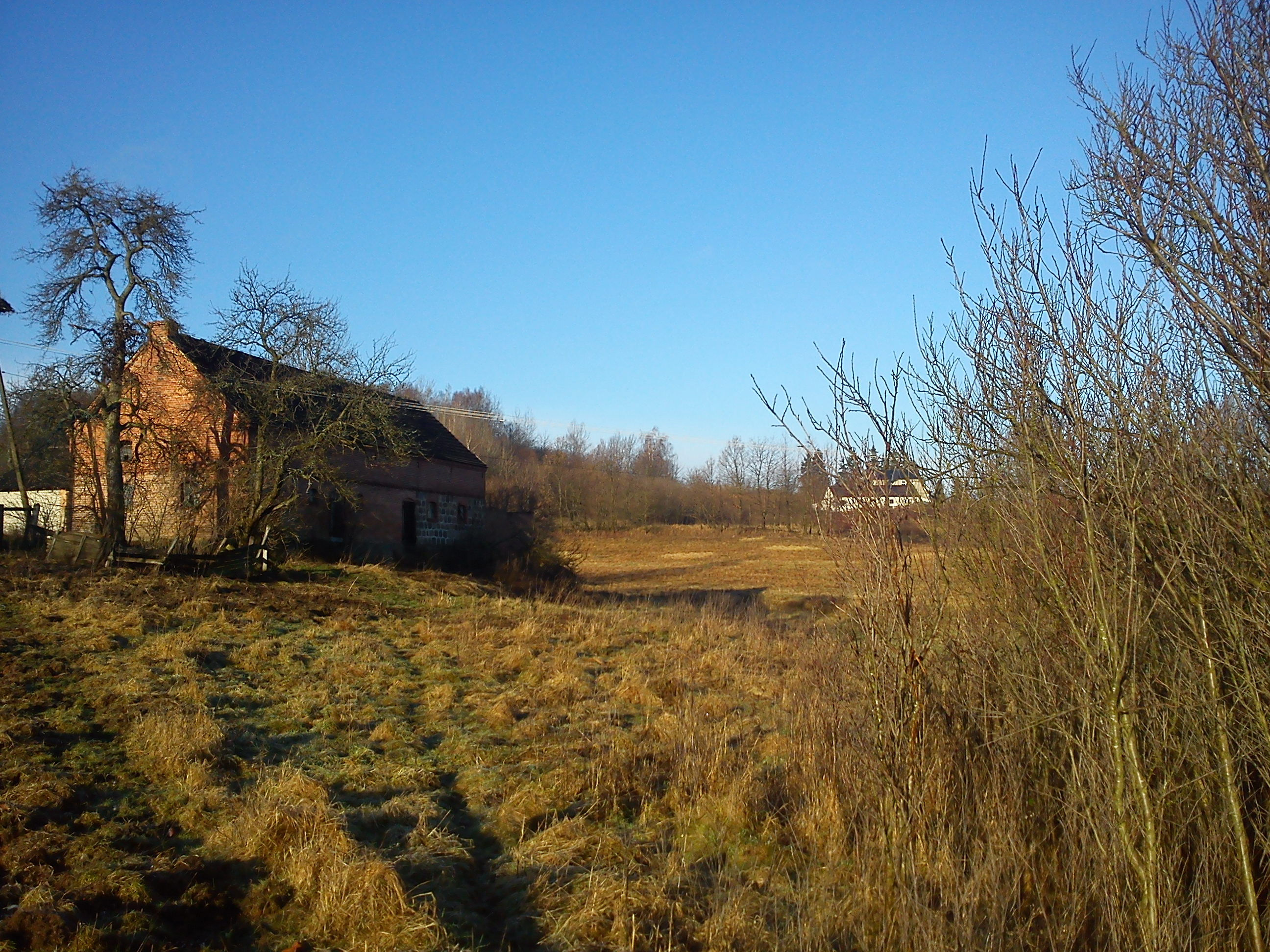 Międzyborze - opuszczone gospodarstwo